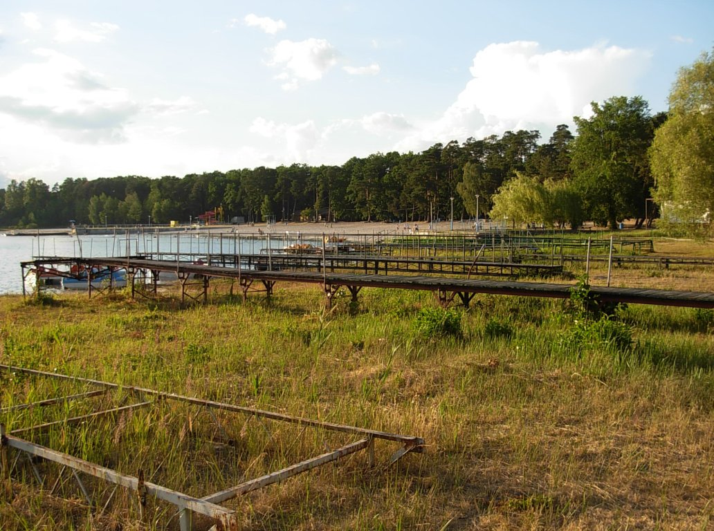 Jezioro Ostrowskie w Przyjezierzu